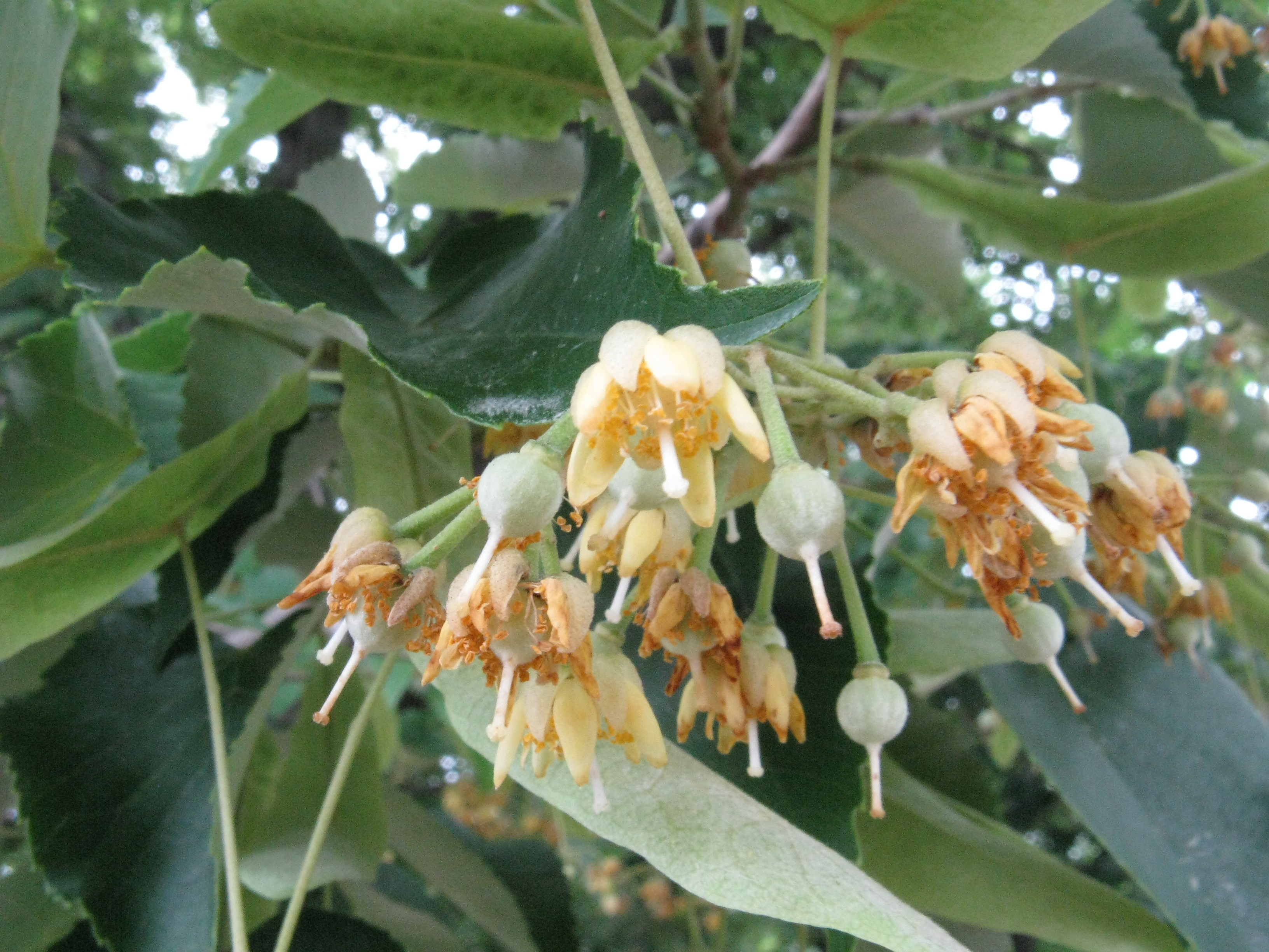 Scientific name Tilia miqueliana